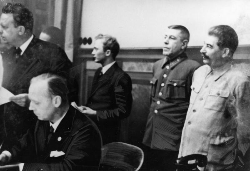 Dtsch.-Sowjet. Grenz- u. Freundschaftsvertrag ADN-ZB/Archiv Sowjetunion, September 1939 In Moskau wird am 28.9.1939 zwischen dem Deutschen Reich und der UdSSR ein Grenz- und Freundschaftsvertrag sowie eine gemeinsame politische Erklärung unterzeichnet. Der deutsche Reichsaußenminister Joachim von Ribbentrop während der Unterzeichnung; v.r. J. W. Stalin, der sowjetische Generalstabschef B. M. Schaposchnikow, Botschaftssekretär Perlow [gemeint ist Wladimir Pawlow] von der sowjetischen Botschaft in Berlin und der UdSSR-Botschafter in Berlin Schkwarzew. Abgebildete Personen: Ribbentrop, Joachim von: Außenminister, NSDAP, Deutschland Schaposchnikow, Boris: Marschall, Sowjetunion (GND 11882600X) Schkwarzew, Alexander: Botschafter in Deutschland, Sowjetunion Stalin, Josef W.: 1878-1953; Marschall, Vorsitzender des Ministerrates, Generalsekretär der KP, Sowjetunion (GND 118642499)